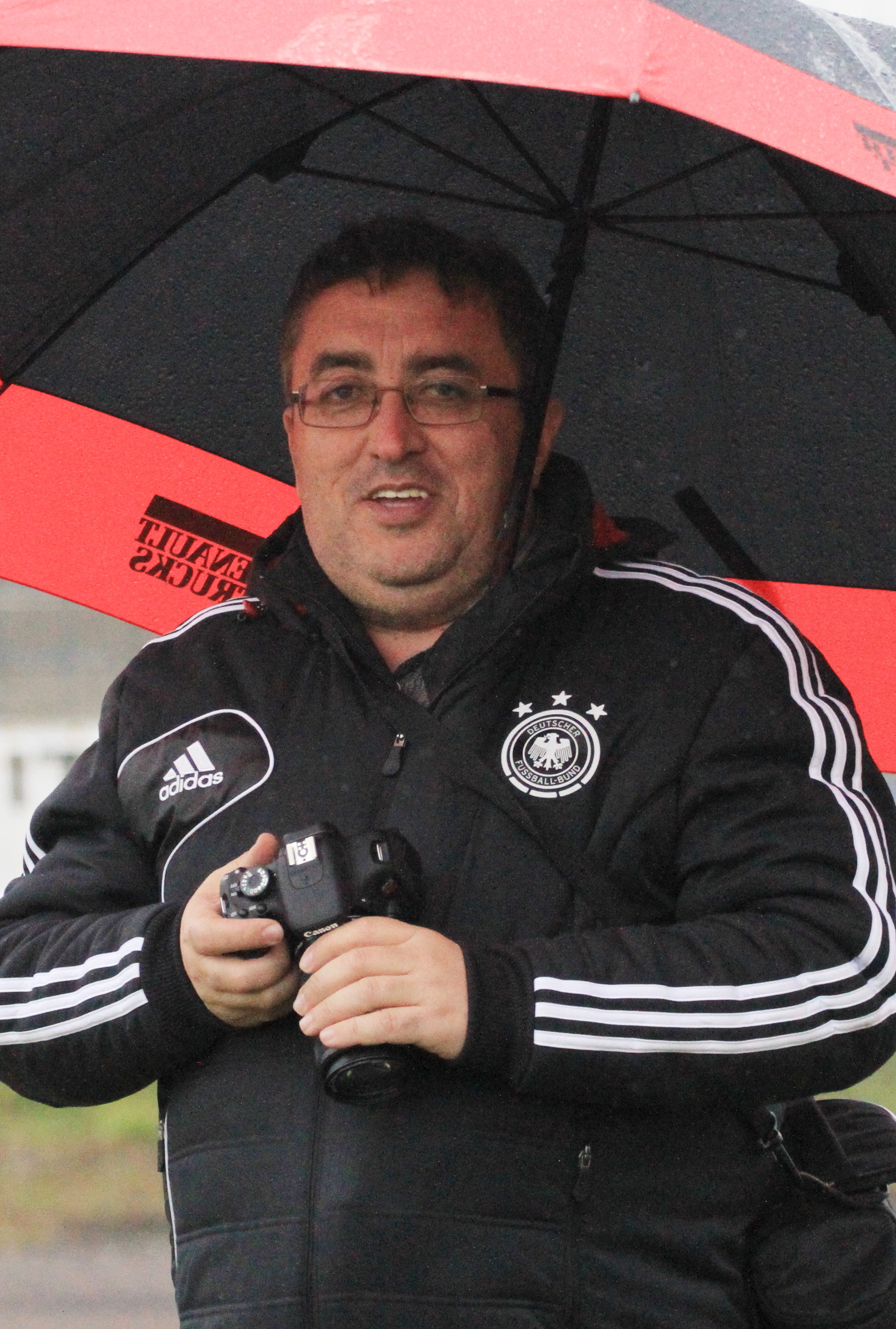 Валентин Грънчаров - български радио журналист, водещ в Дарик Радио